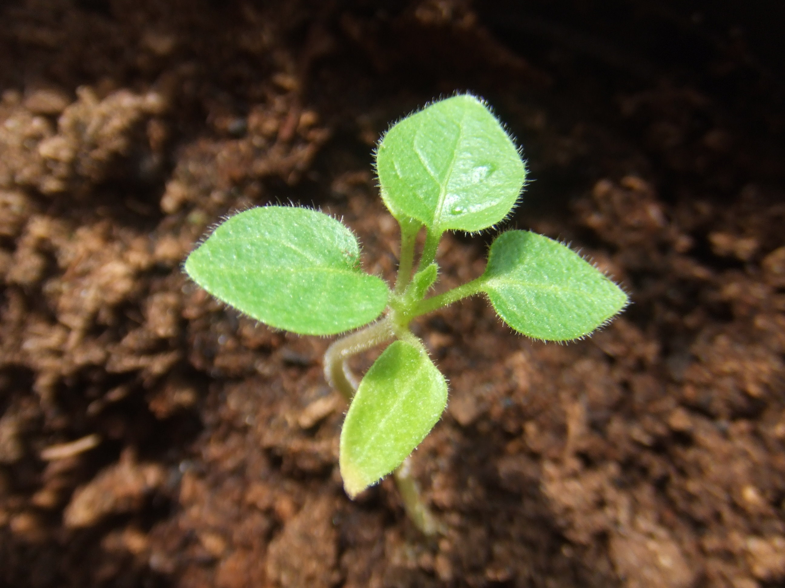 Zaailing van de tamarillo, verkregen uit eigen kweek.